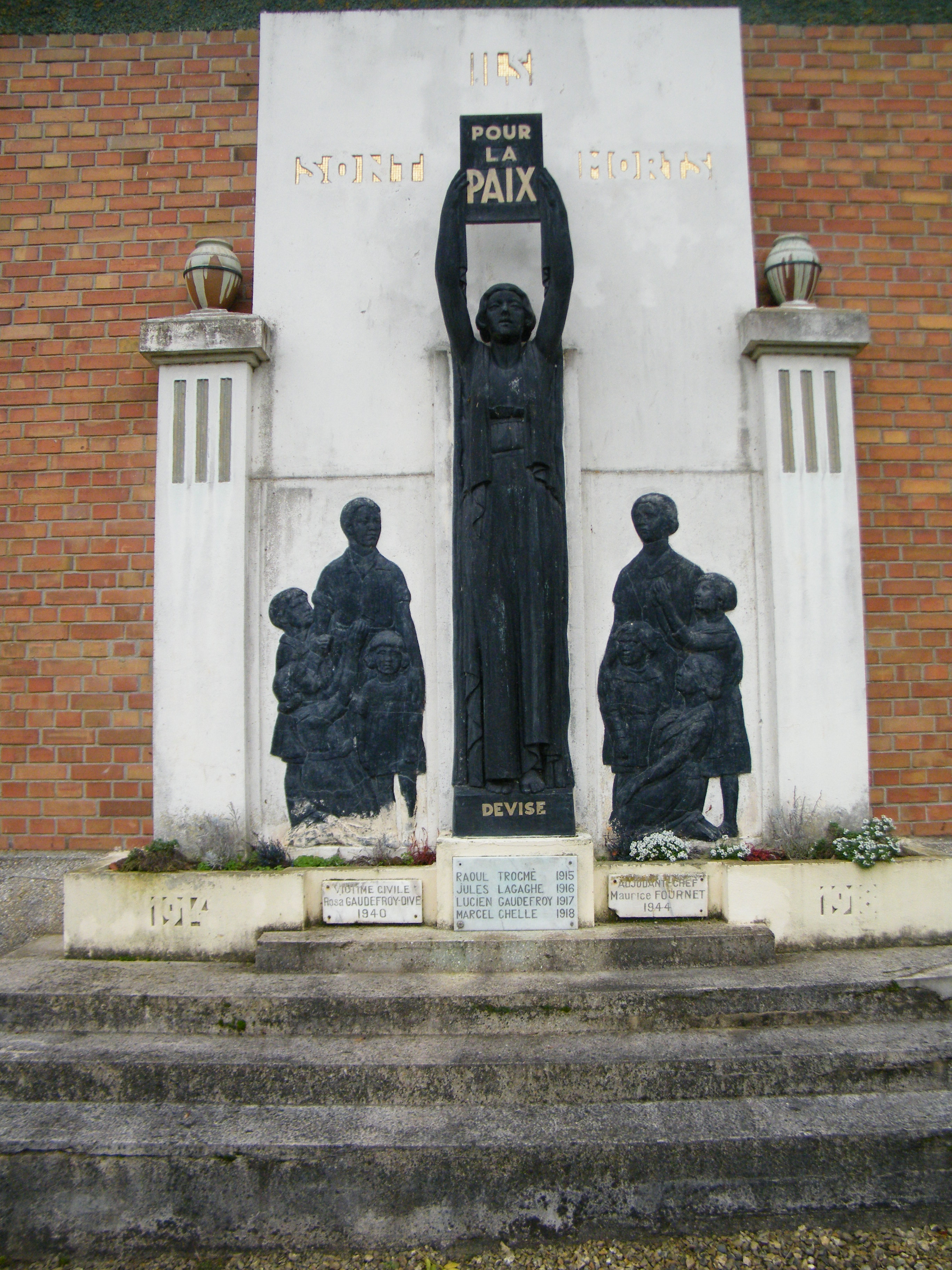 Monument.